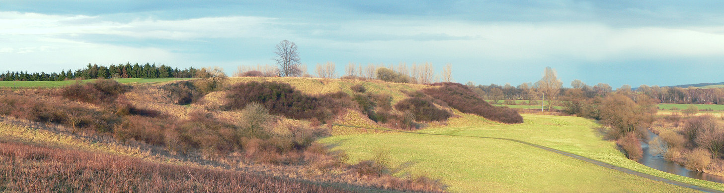 Panoramablick auf frühere Pfalz Werla auf Bergsporn über der Oker